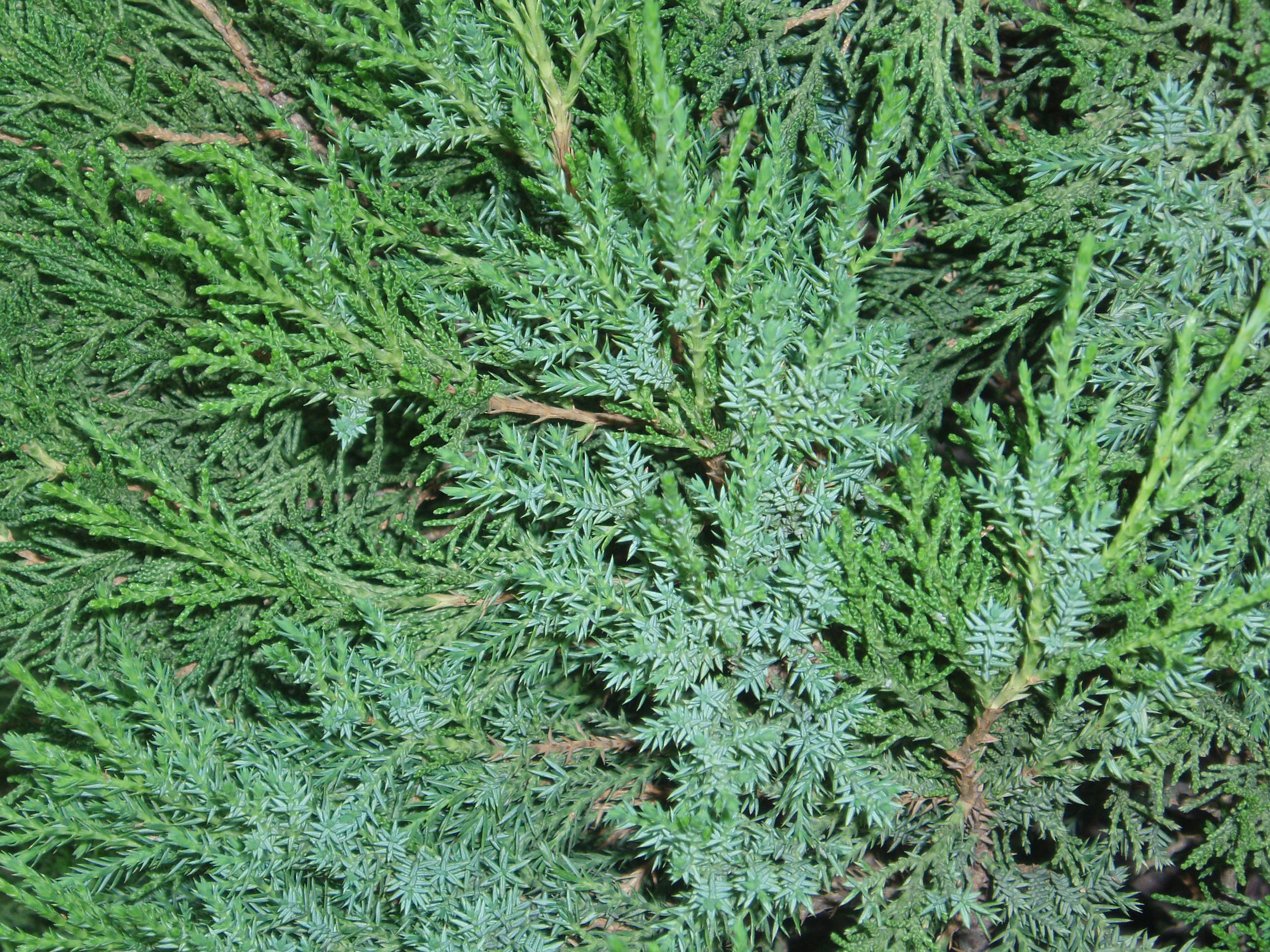 Chinese juniper leaves